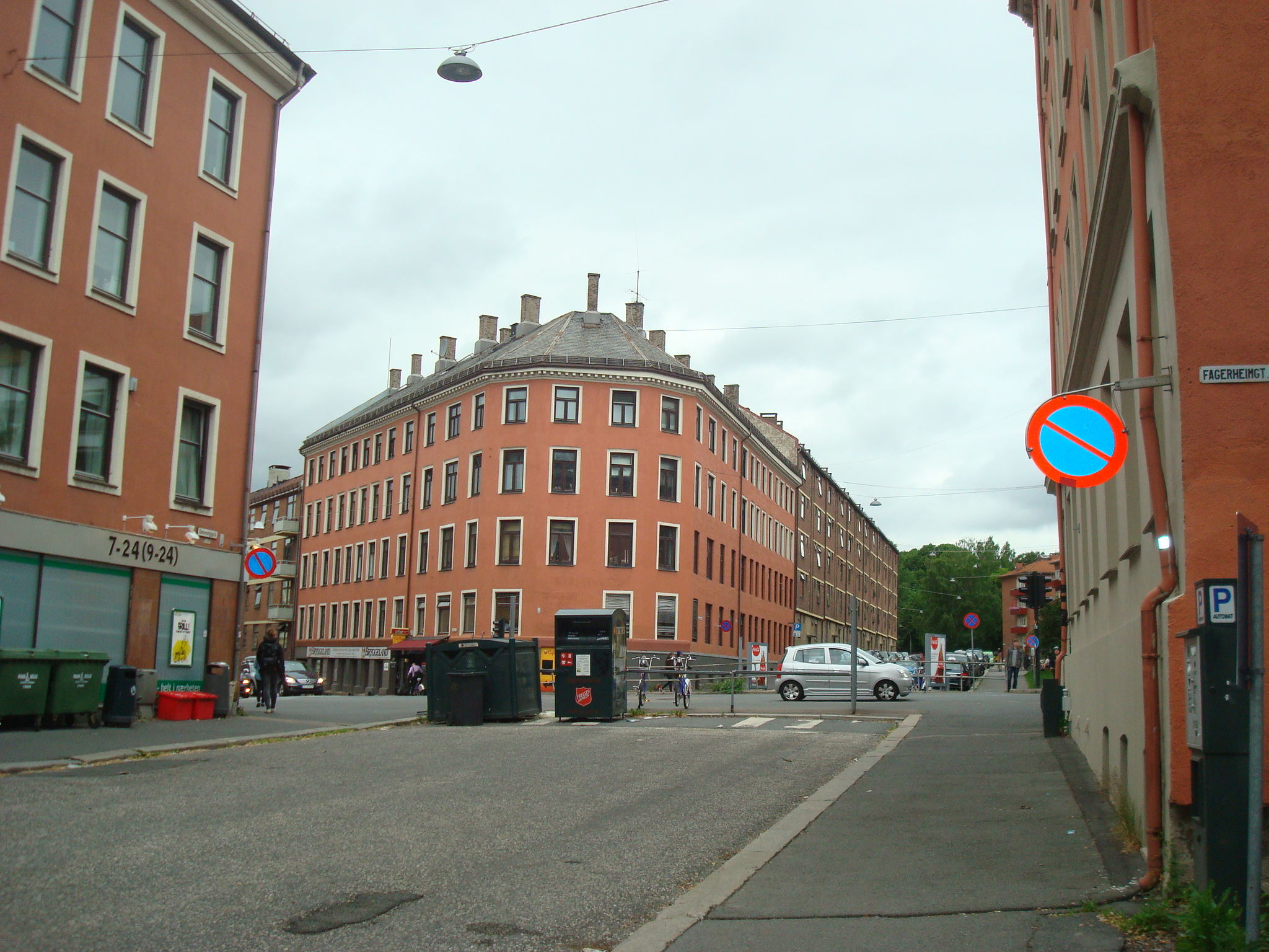 Dælenenggata i Oslo. Bilde der den er delt og stengt ved Fagerheimgata.